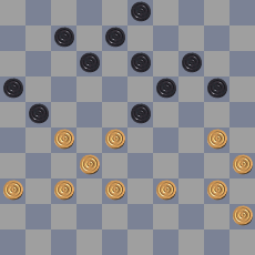 Zelfgemaakt diagrammetje van Coup Springer